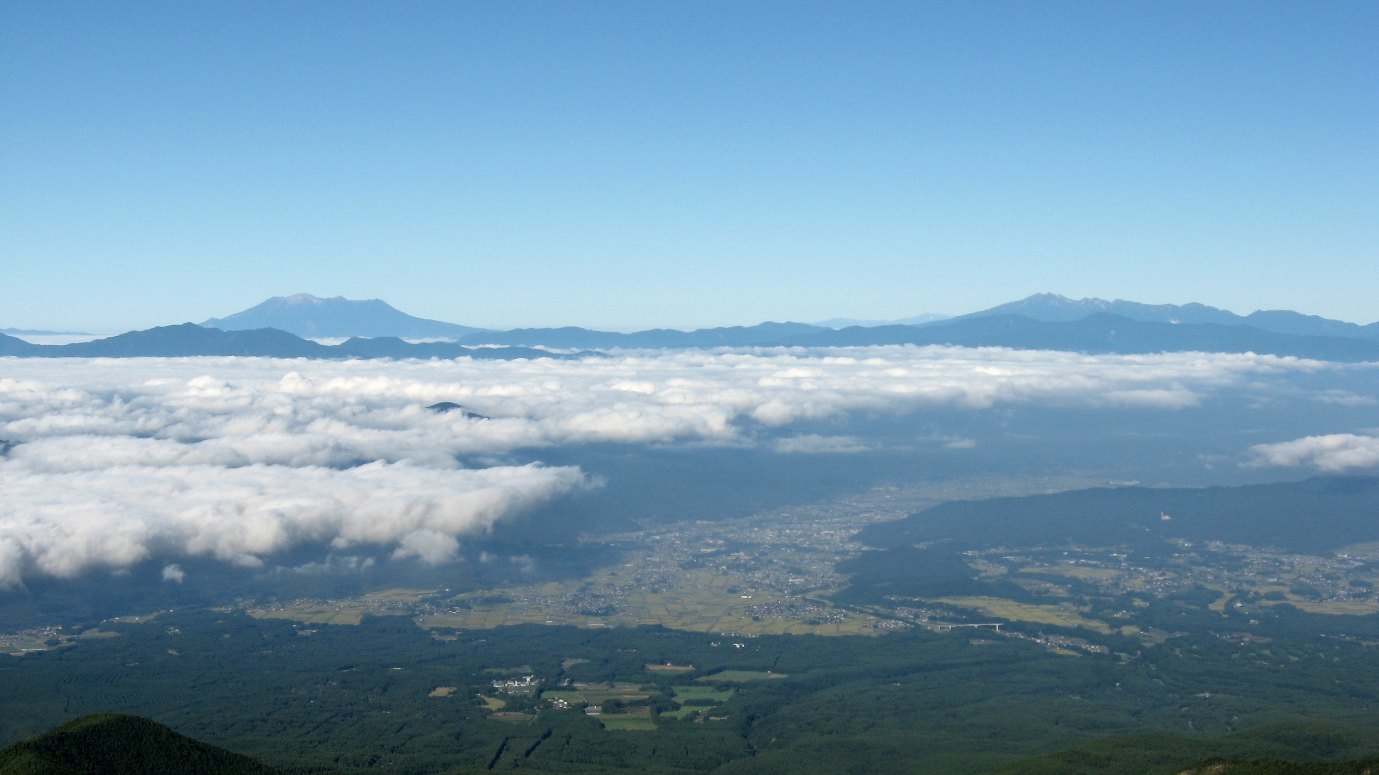 八ヶ岳より望む御嶽山と乗鞍岳